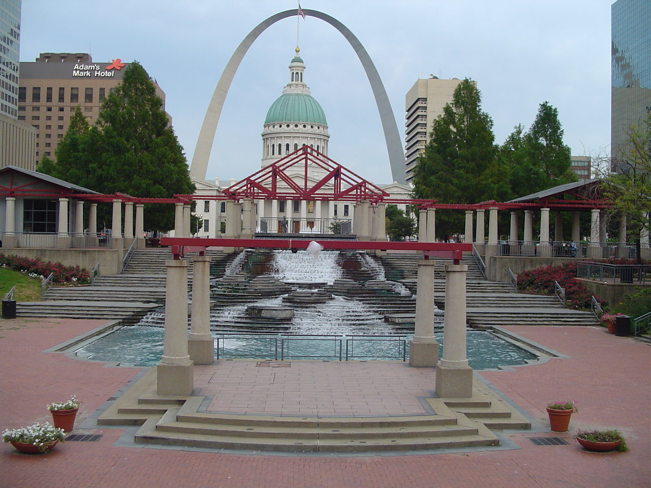 St. Louis, MO